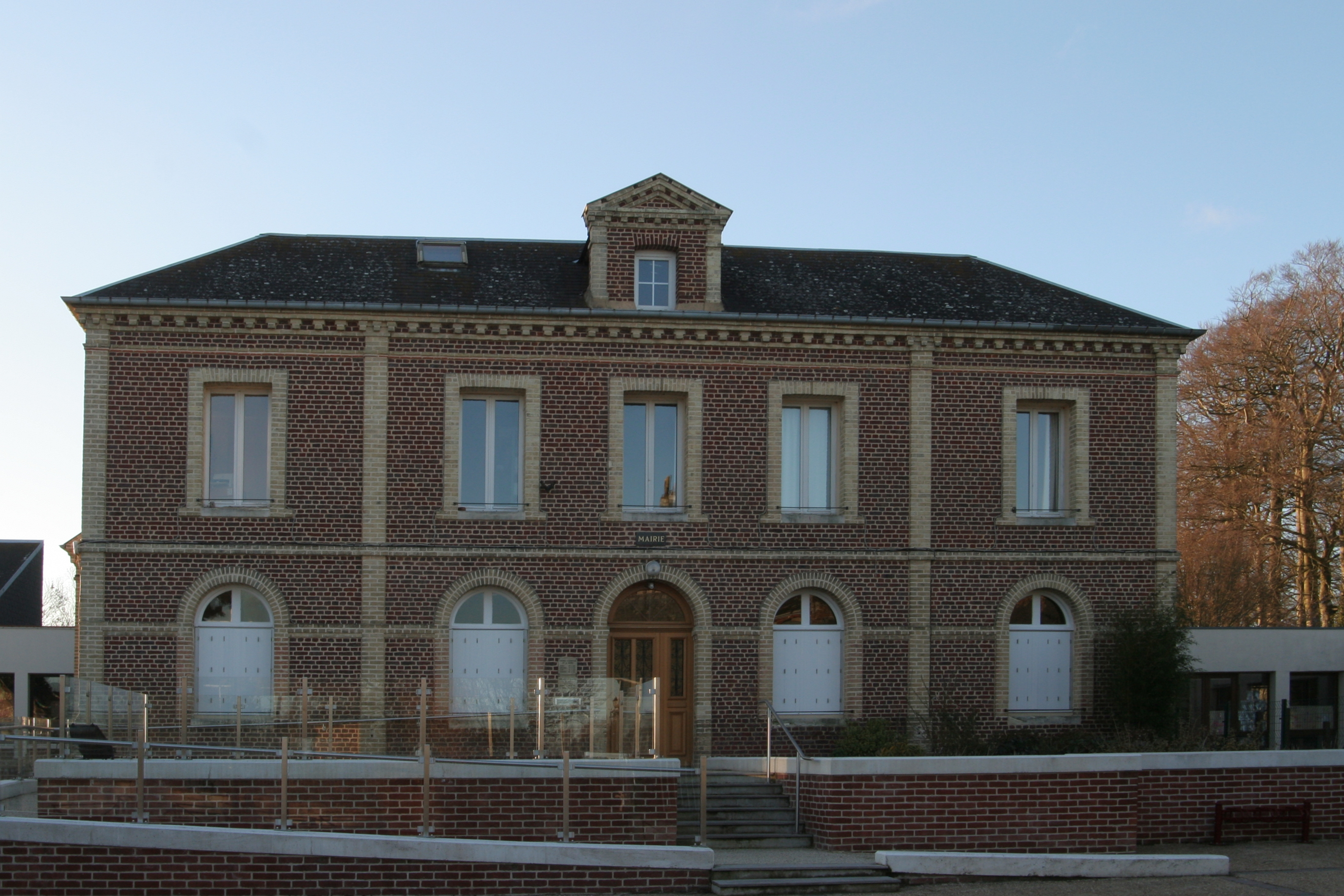 Mairie de Saint-Eustache-la-Forêt.